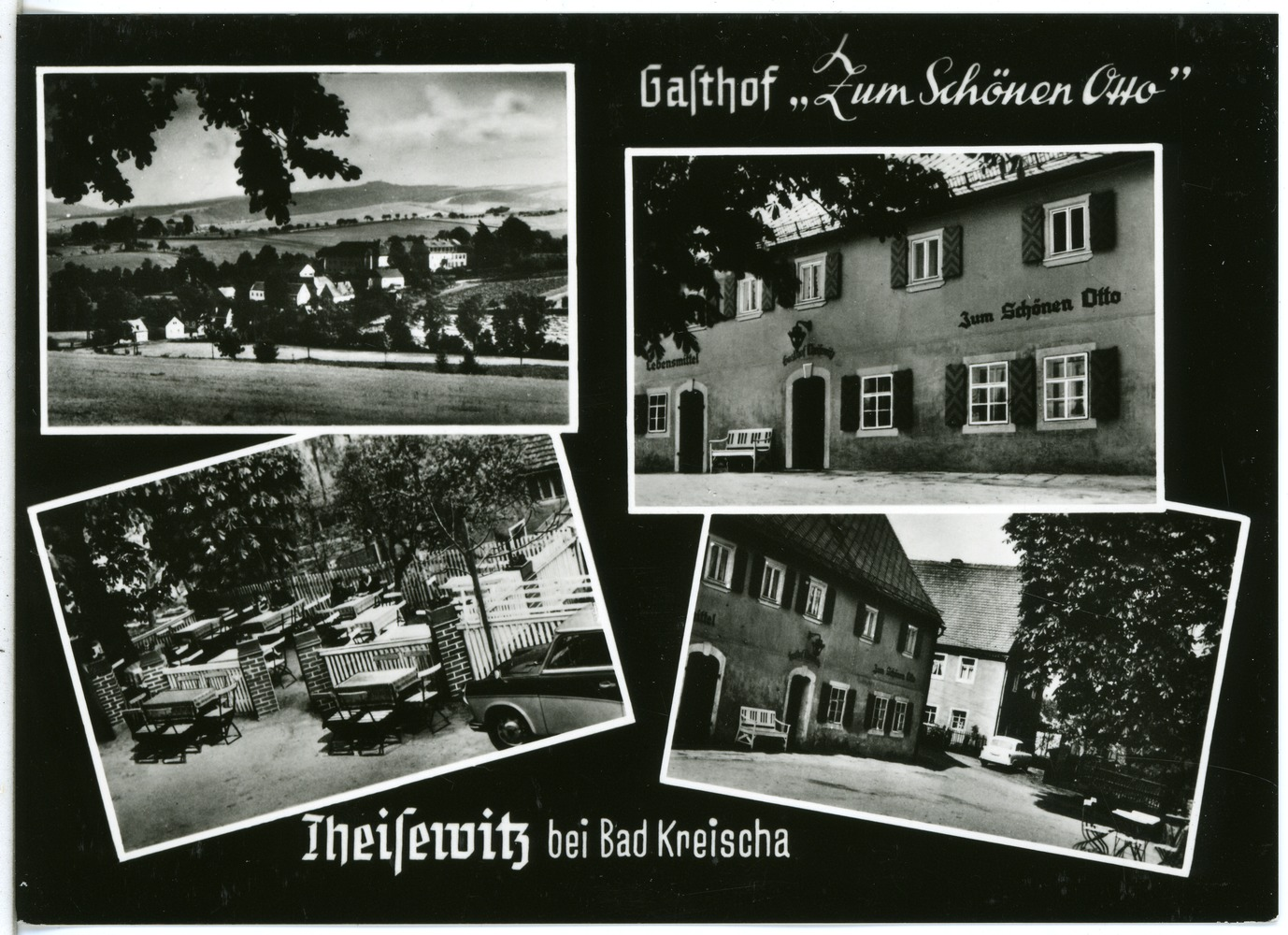 Theisewitz; Gasthof "Zum Schönen Otto" This postcard is from publisher Brück & Sohn in Meißen ( postcard has a unique number 29829 and is available in a higher resolution at the publisher. This images was uploaded in a cooperation project between Wikipedians and the publisher.